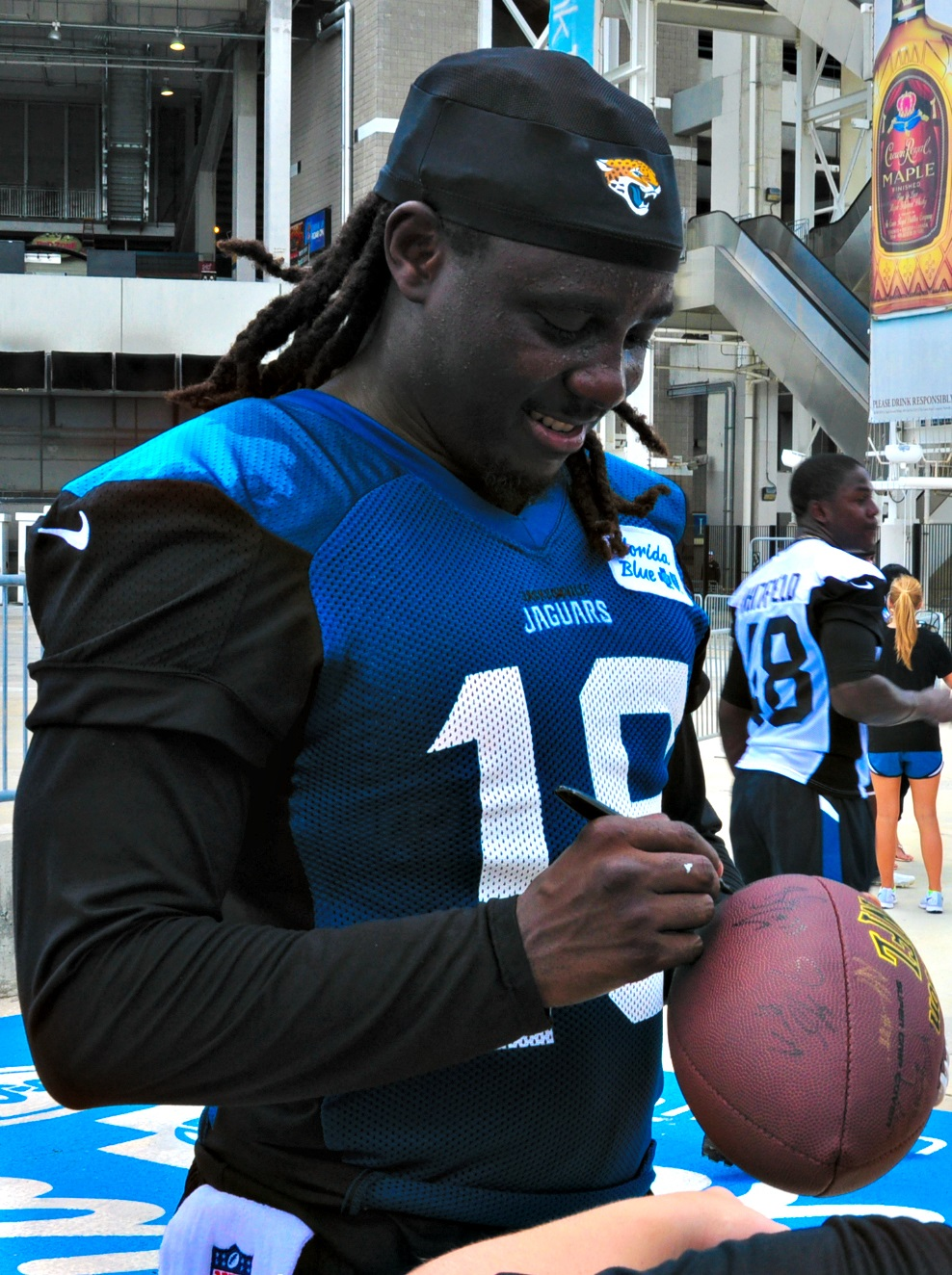 Denard Robinson at 2014 Jaguars training camp.